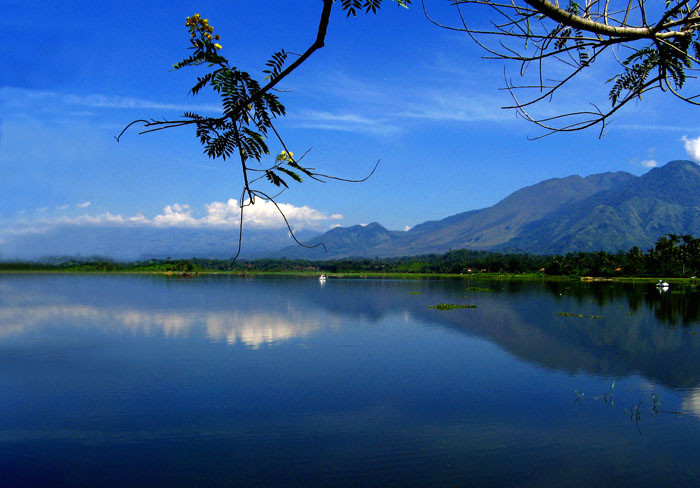 Situ Bagendit di Garut, Jawa Barat